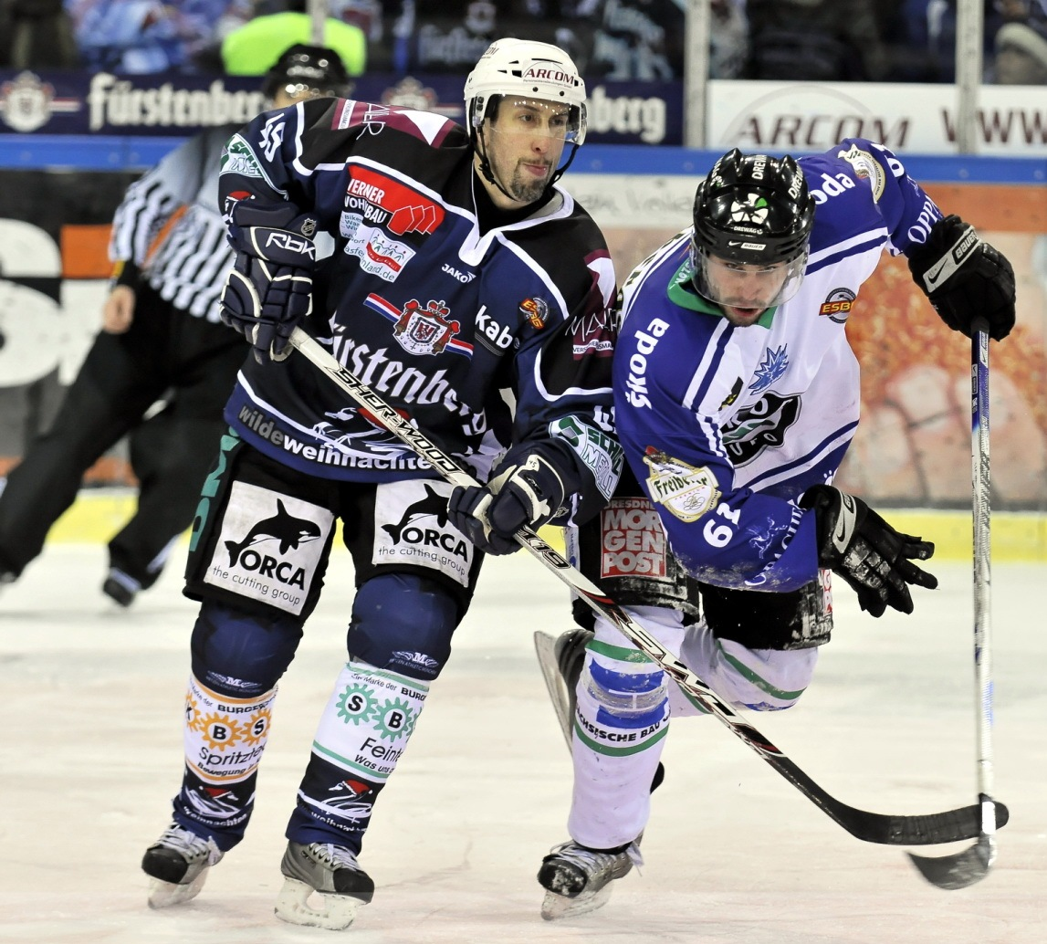 Dany Bousquet, SERC Wild Wings vs. Michael Schmerda, Dresdner Eislöwen